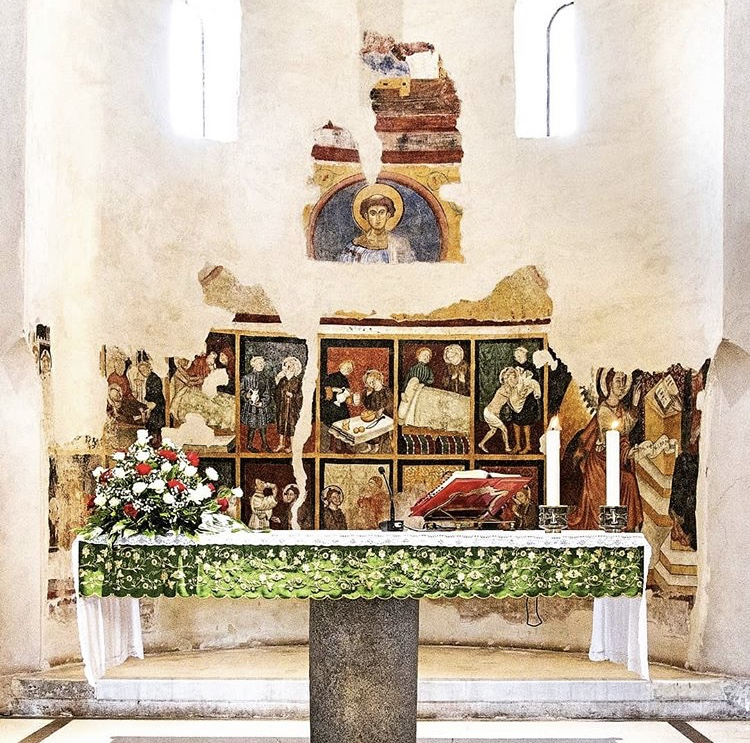 Abside ed altare con cristo phantocreatore